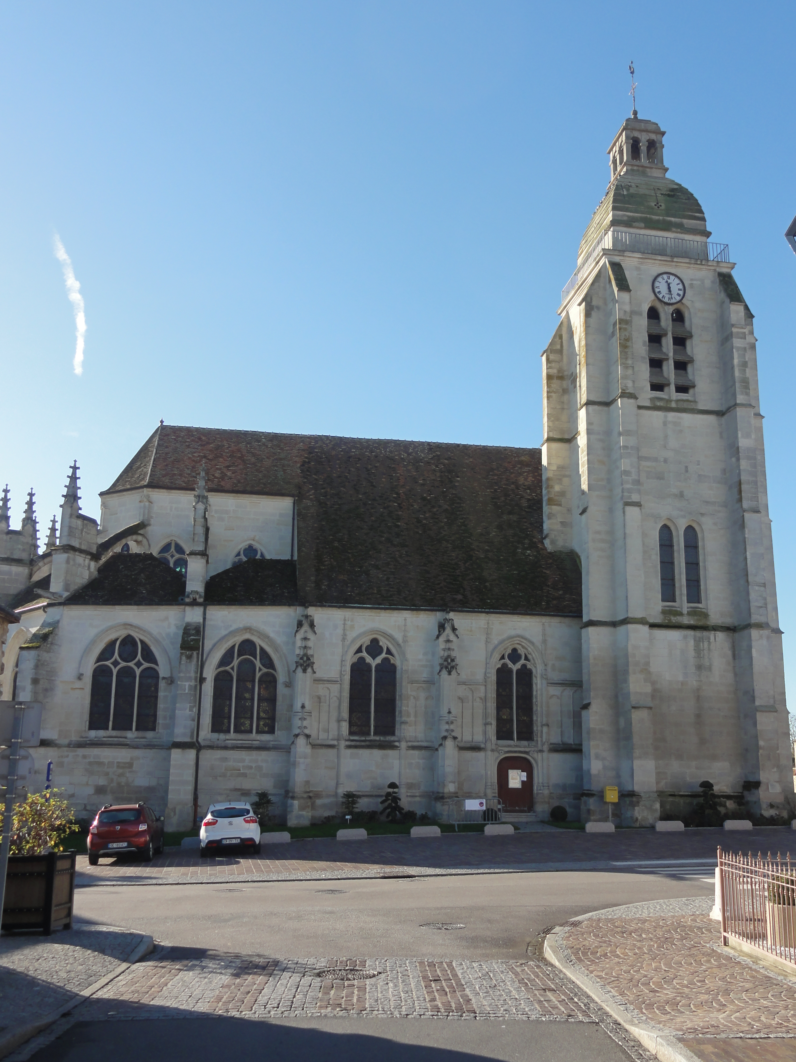 Église Saint-Martin du Mesnil-Amelot - voir titre.